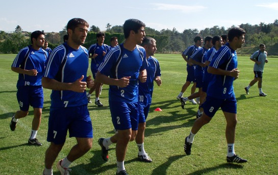 FC Karabakh Agdam (Азербайджан)